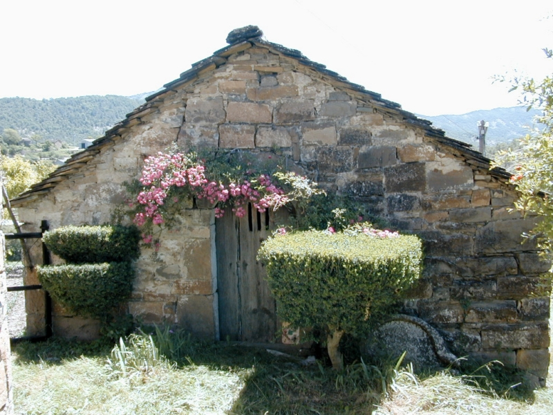 Entrada de la capilla dedicada a San Antonio de Padua en Arro (Huesca)